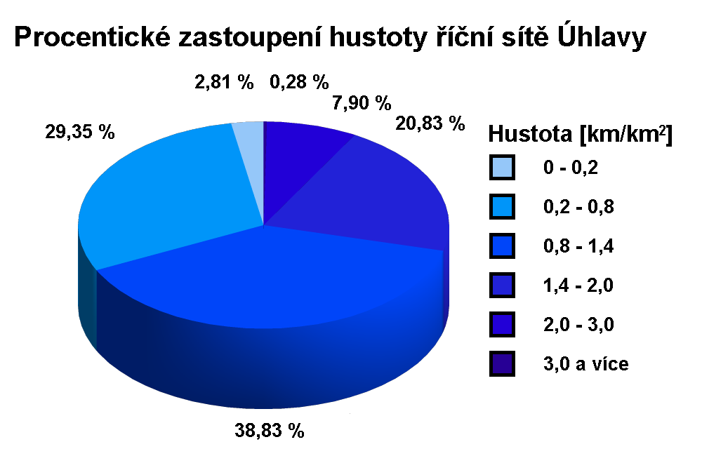 Procentické zastoupení hustoty říční sítě Úhlavy